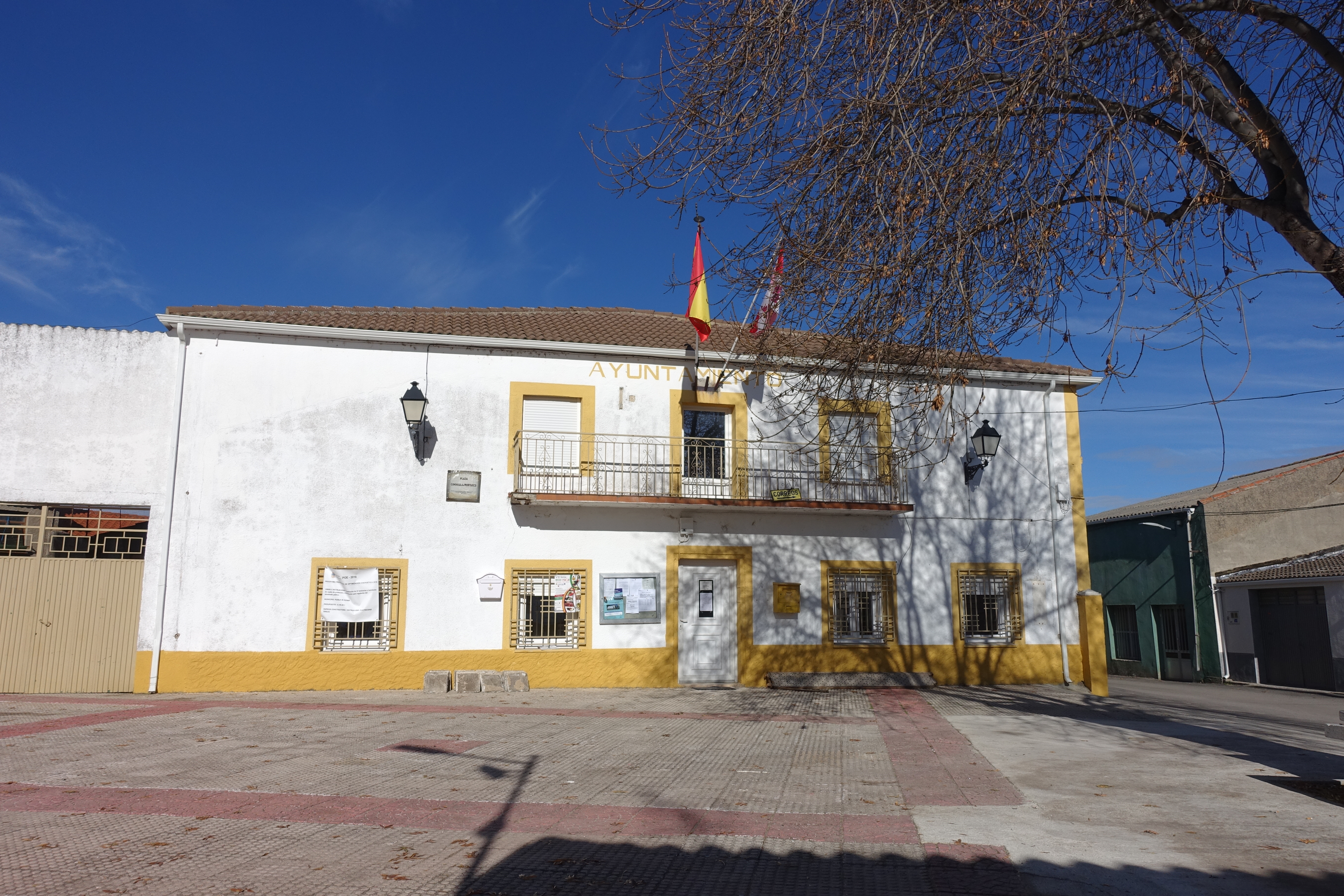 Casa consistorial de Puebla de Azaba (Salamanca, España).